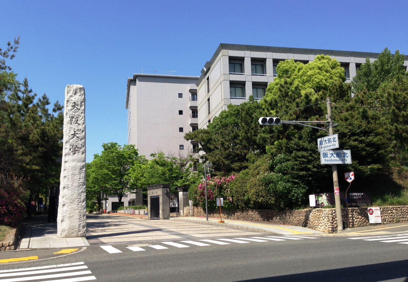 大阪大学豊中キャンパス正門